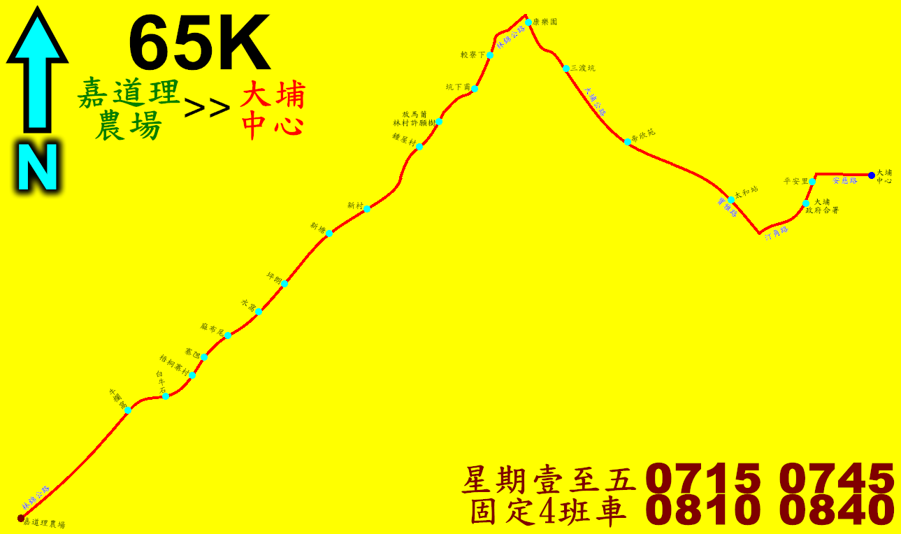 中文（香港）: 九巴65K線的走線圖